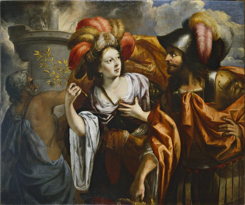 Cивілла Кумська чаклунською гілкою забезпечує безпечний шлях Енею: міфологічна картина